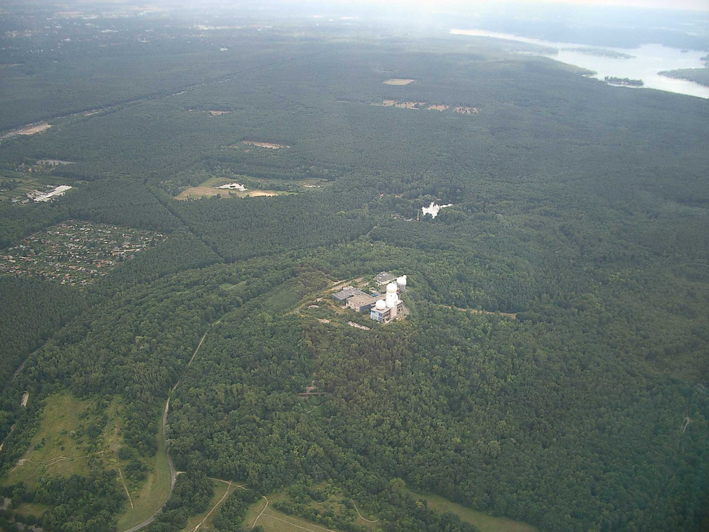 Blick auf Teufelsberg und Teufelssee